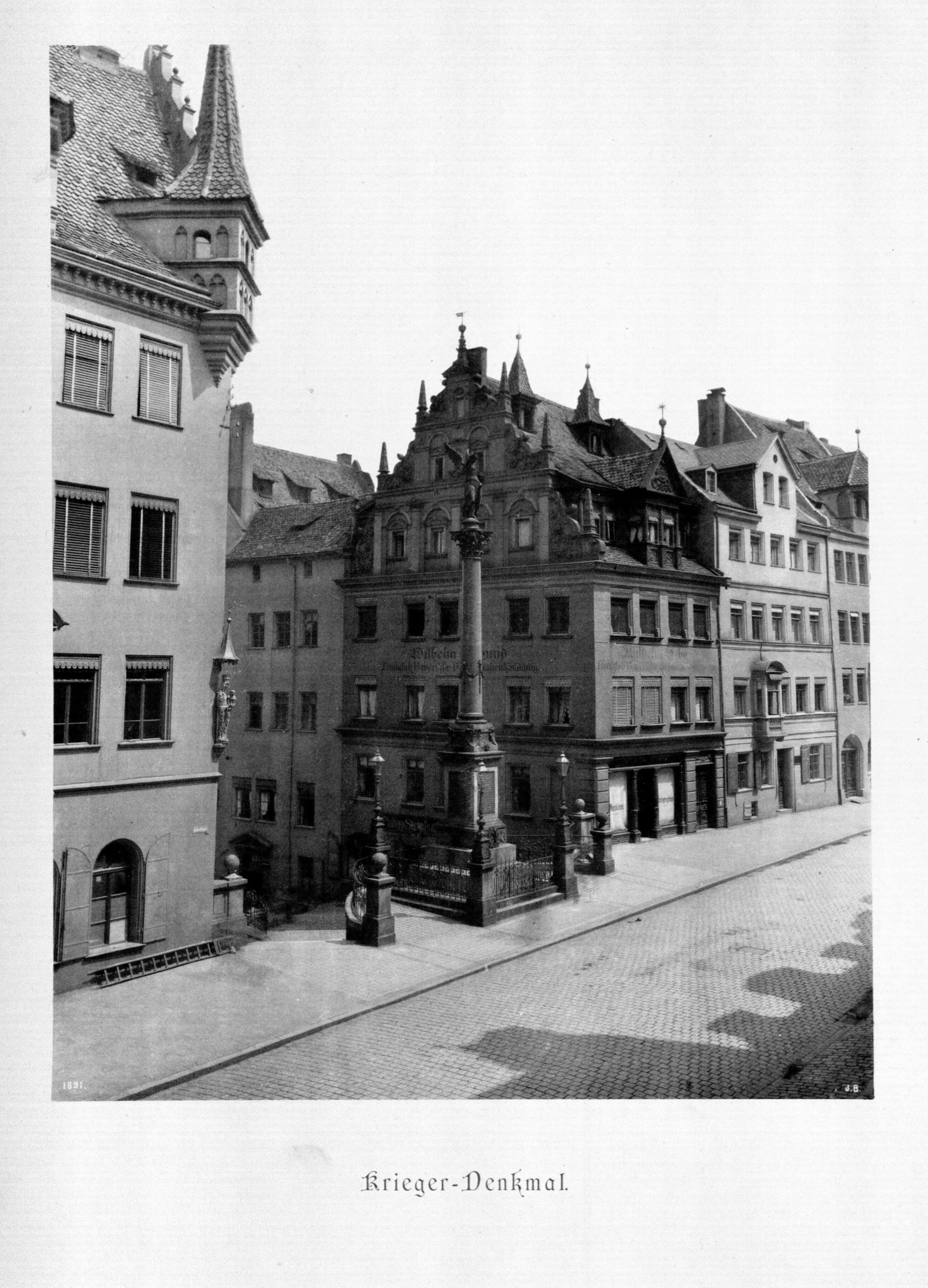 Krieger-Denkmal. aus dem Band Die Baudenkmäler der Stadt Nürnberg. Erste Nürnberger Lichtdruckanstalt & Kunstverlag Brunner. Nürnberg 1891. 2011 digitalisiert von der Ohm-Hochschulbibliothek Nürnberg. Exemplar mit der Signatur: Nürnberg, Ohm-Hochschulbibliothek -- 901/2.213 / M a